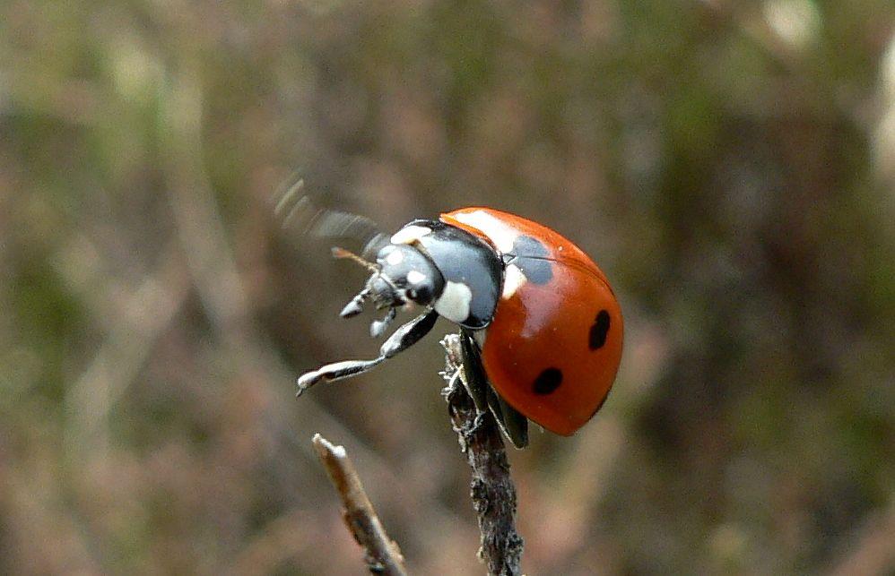 Coccinella septempunctata